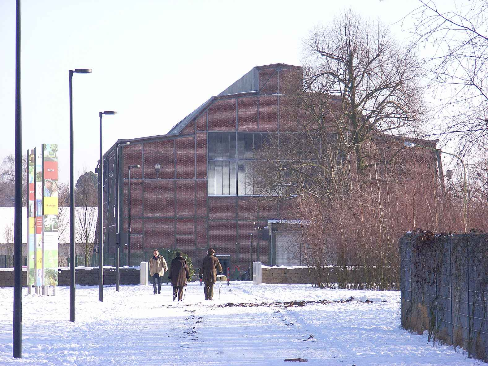 Werkshalle der Grube Carl Alexander, Baesweiler, NRW